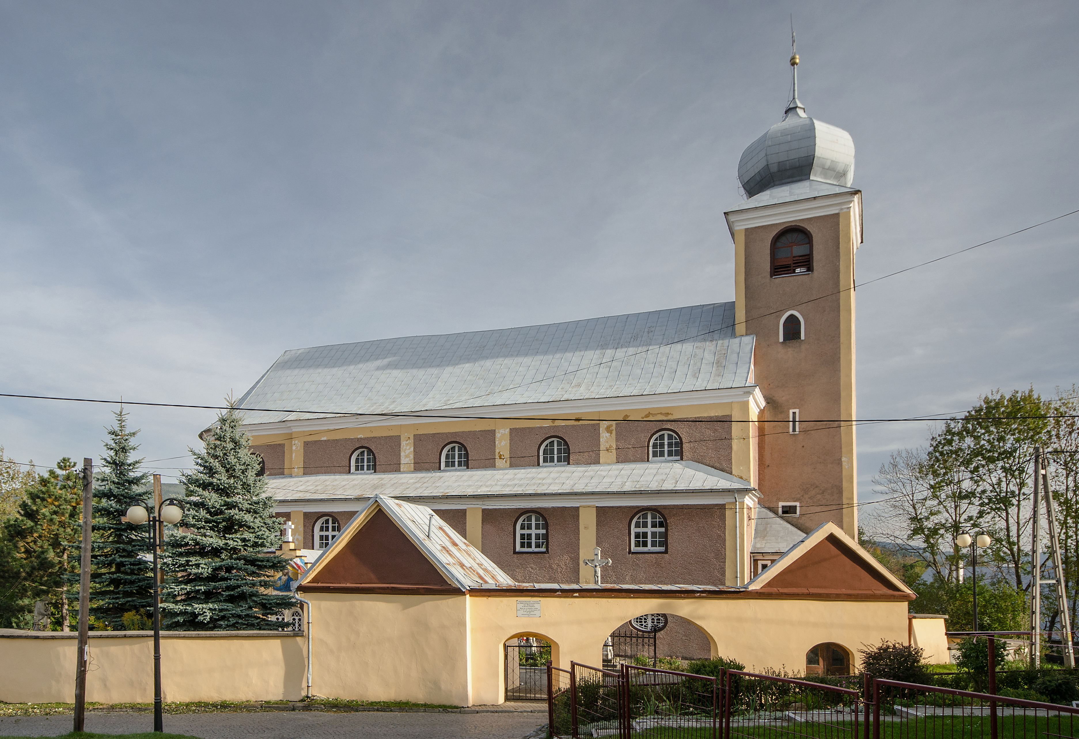 Stronie Śląskie, kościół p.w. Matki Bożej Królowej Polski i św. Maternusa, XVIII